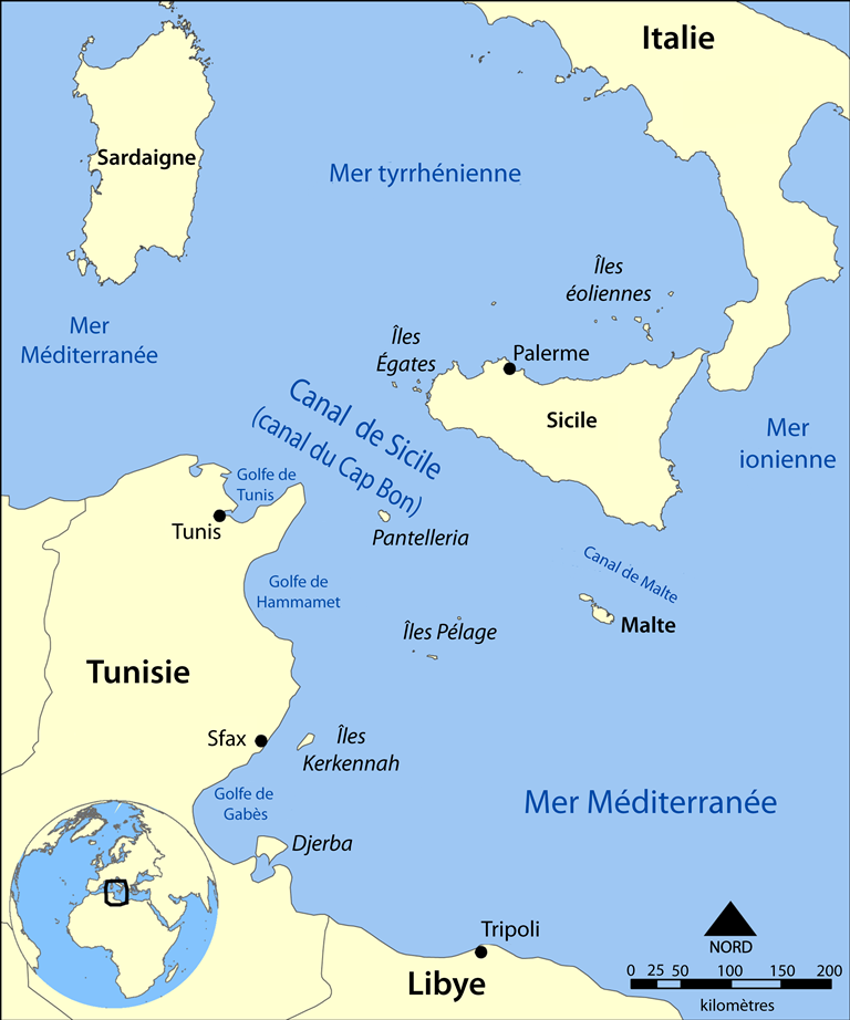 Environs du Canal de Sicile, aussi appelé Canal du Cap Bon, qui sépare la Tunisie de la Sicile.